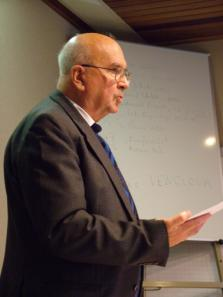 John Rapley en Malferma Tago, aprilo 2005